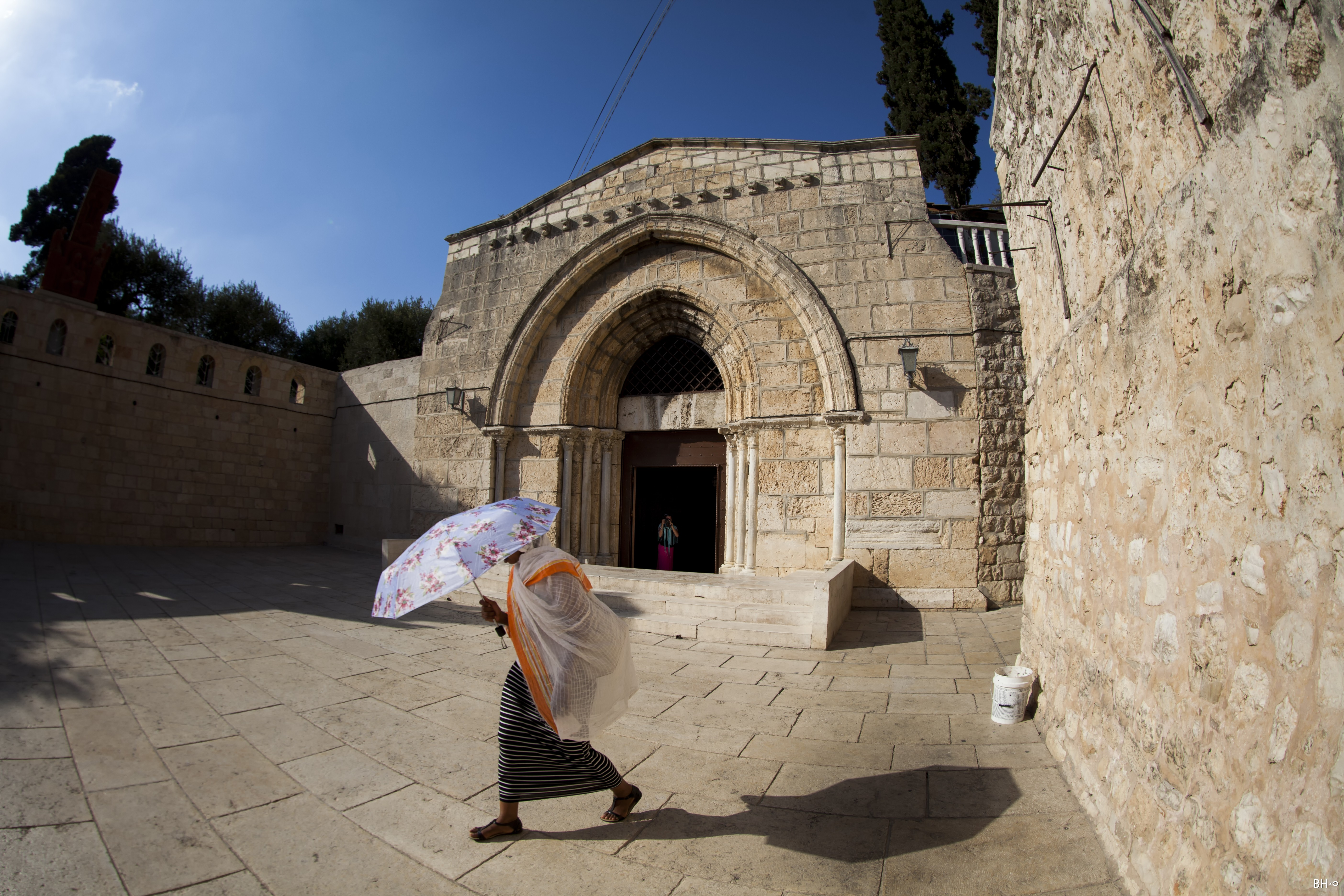 Chiesa assunzione di Maria Dettaglio